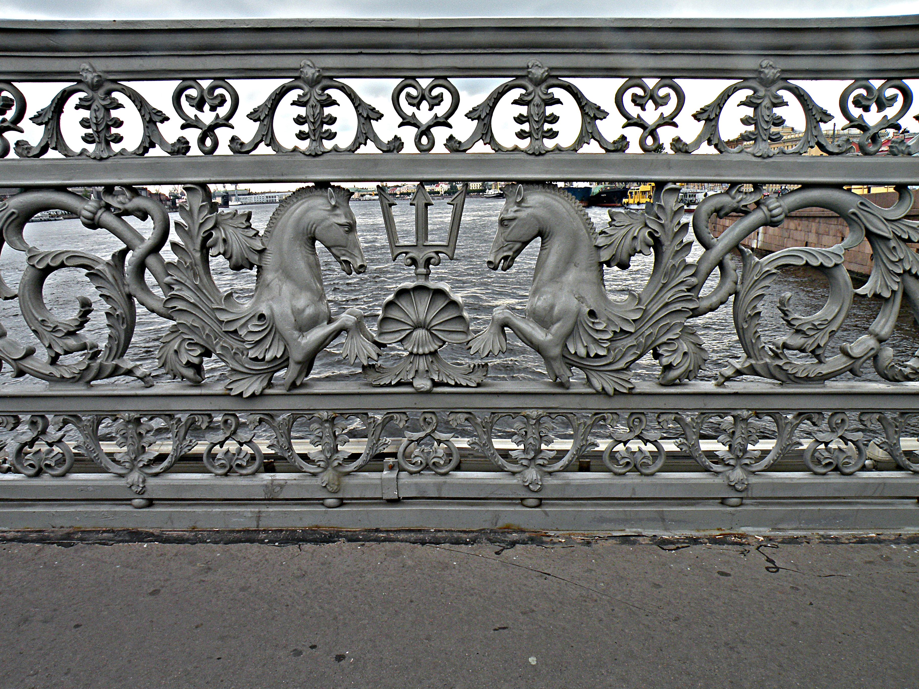 Брюллов Александр Павлович (1798 -1877) Решётка Благовещенского моста._